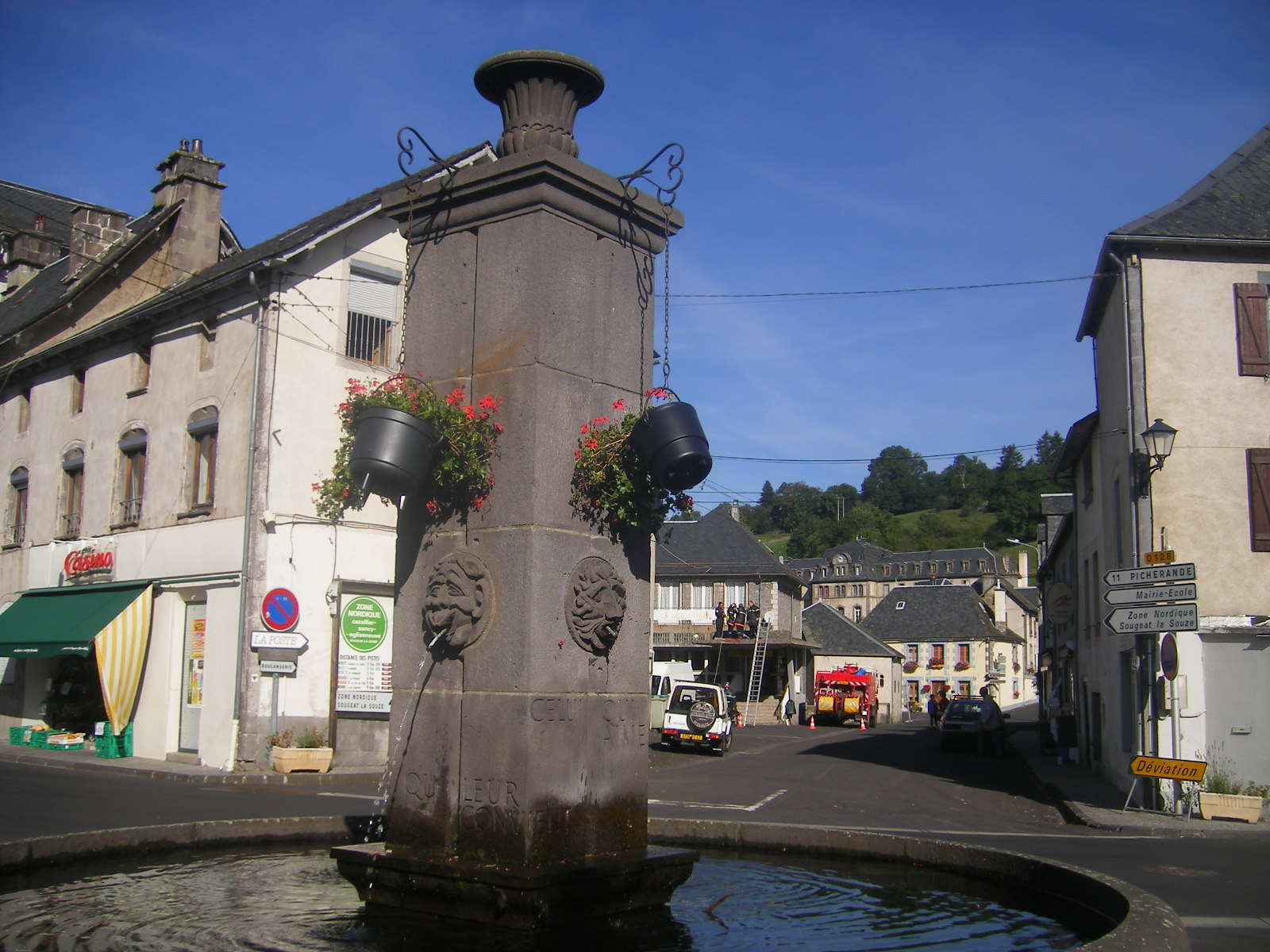 Égliseneuve-d'Entraigues